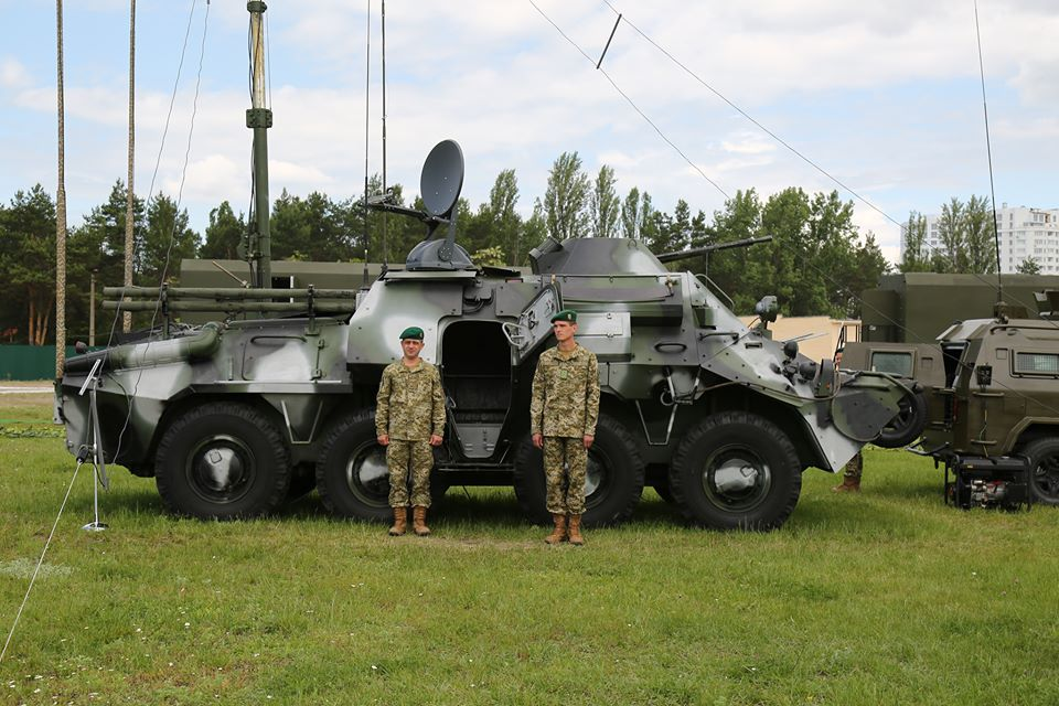 24 травня Комісар Митної та прикордонної служби США Гіл Керліковські відвідав 10-ий мобільний прикордонний загін в Бортничах, де знаходиться найбільш підготовлений та найкраще оснащений мобільний підрозділ Державної прикордонної служби України. Прикордонники продемонстрували свої можливості кількома показовими вправами та ознайомили з матеріально-технічною базою підрозділу, що безпосередньо вказує на позитивний вплив та доводить результативність спільних зусиль і співпраці з Митною та прикордонною службою США. Серед усього Комісару були представлені броньовані автомобілі та тепловізори, надані в рамках програми технічної допомоги Відділом з правоохоронних питань Посольства США в Україні, а також інша спецтехніка, зокрема, наземні радіолокаційні платформи, всюдиходи і детектори радіоактивного випромінювання. 10-ий мобільний прикордонний загін являється підрозділом Державної прикордонної служби України, якому американські партнери і надалі надаватимуть допомогу в розвитку, оснащенні та навчанні з метою зміцнення кордонів України.